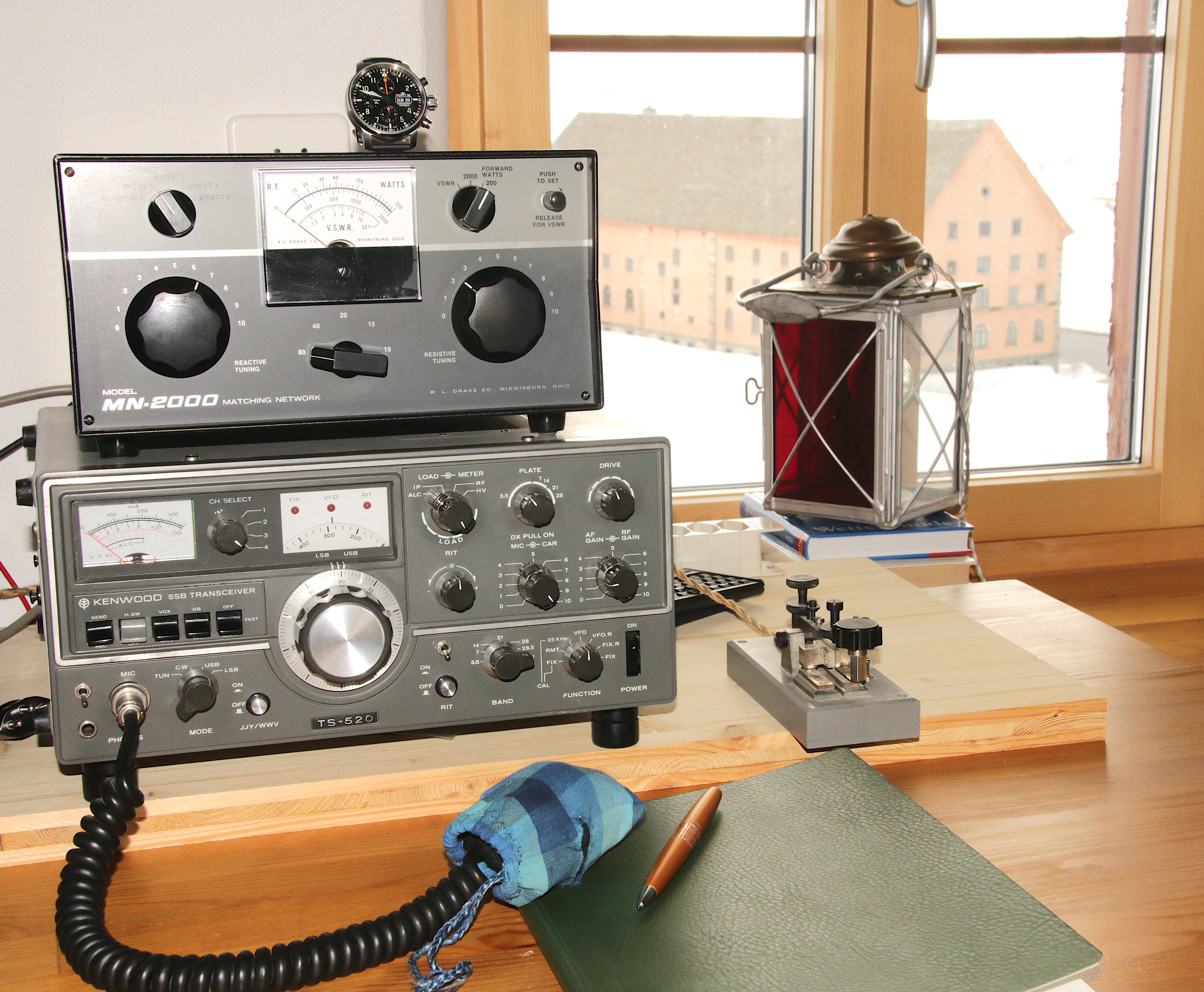 Amateurfunkstation